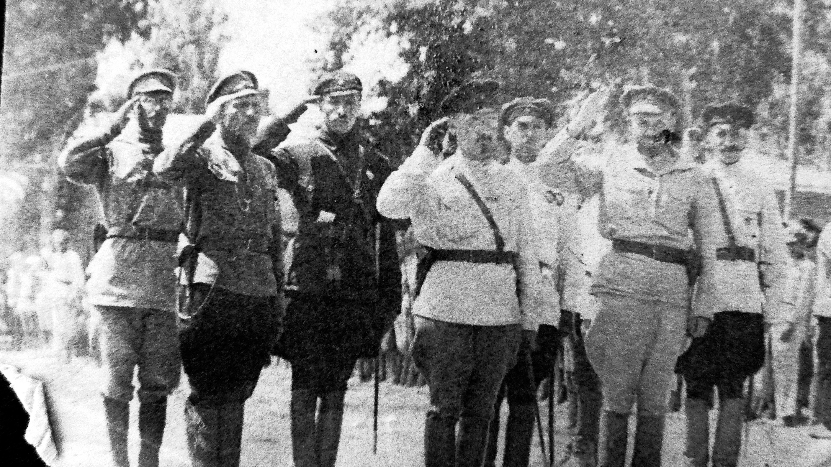 штаб 4-й армии Западного фронта. Третий слева - Г.С.Горчаков